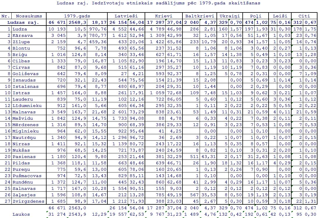 Latvijas 1979. gada tautas skaitīšanas dati